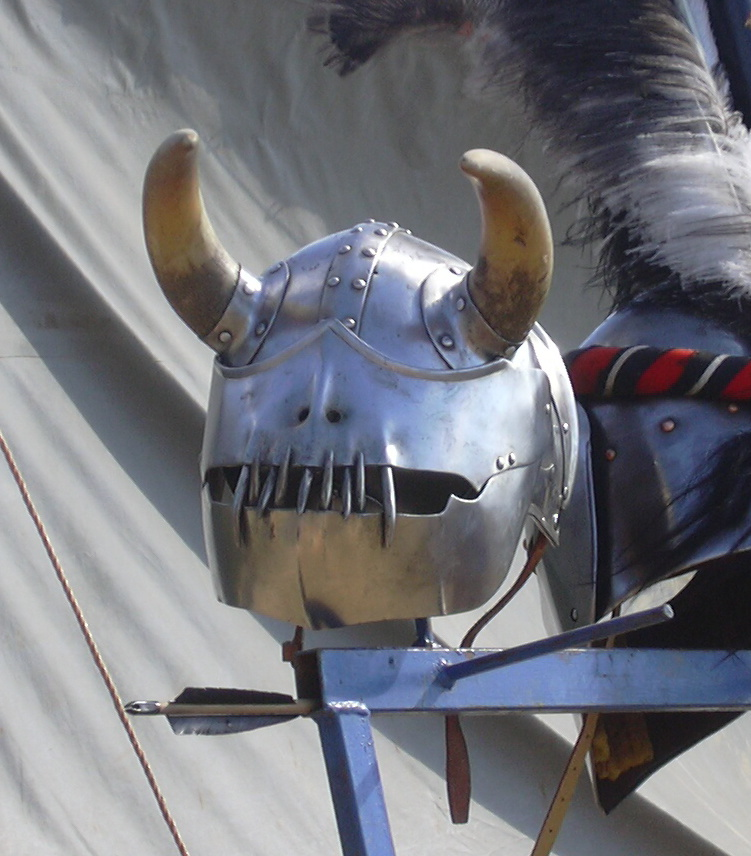 Hrncová přilba